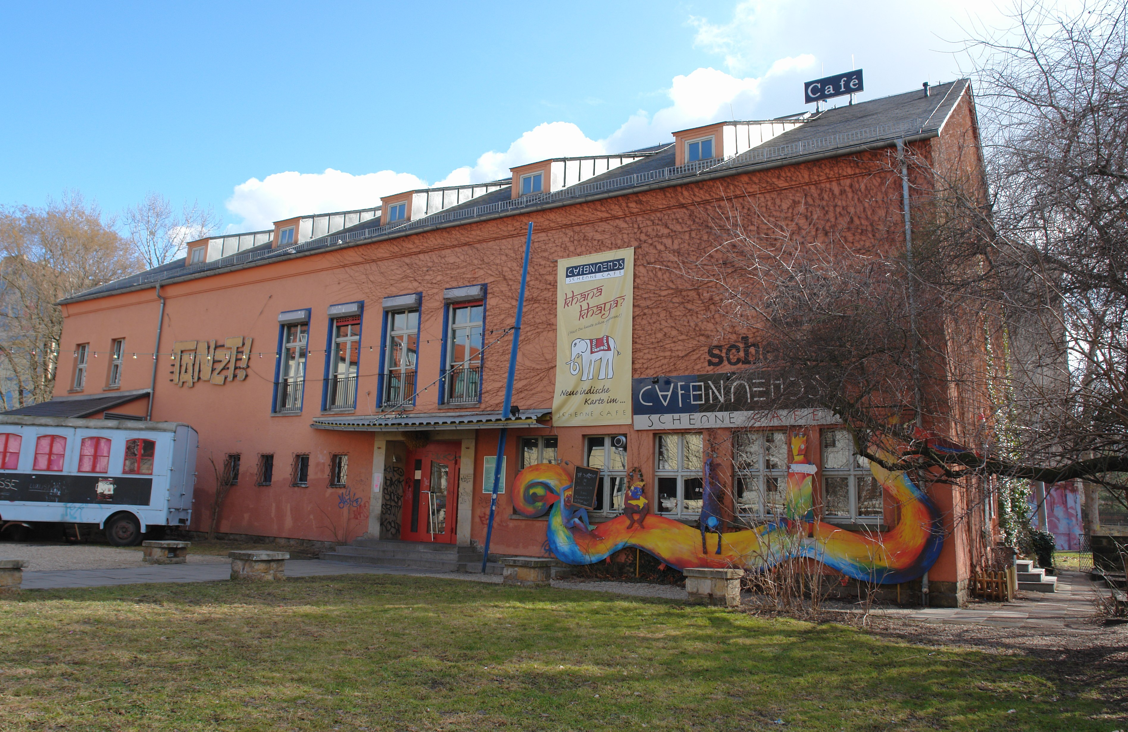 Früher Jugendheim „Martin Andersen Nexö“, heute Kulturzentrum Scheune.